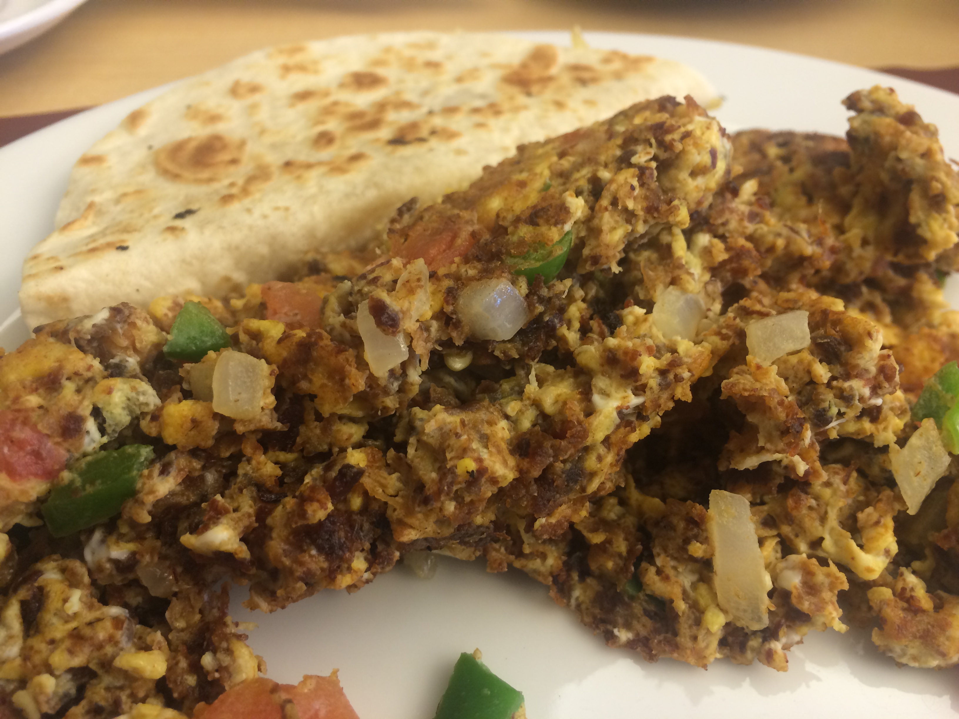 Machacado con huevo, México.